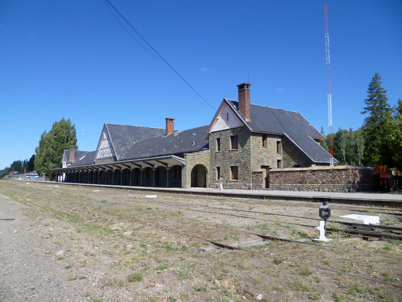 Estación Bariloche